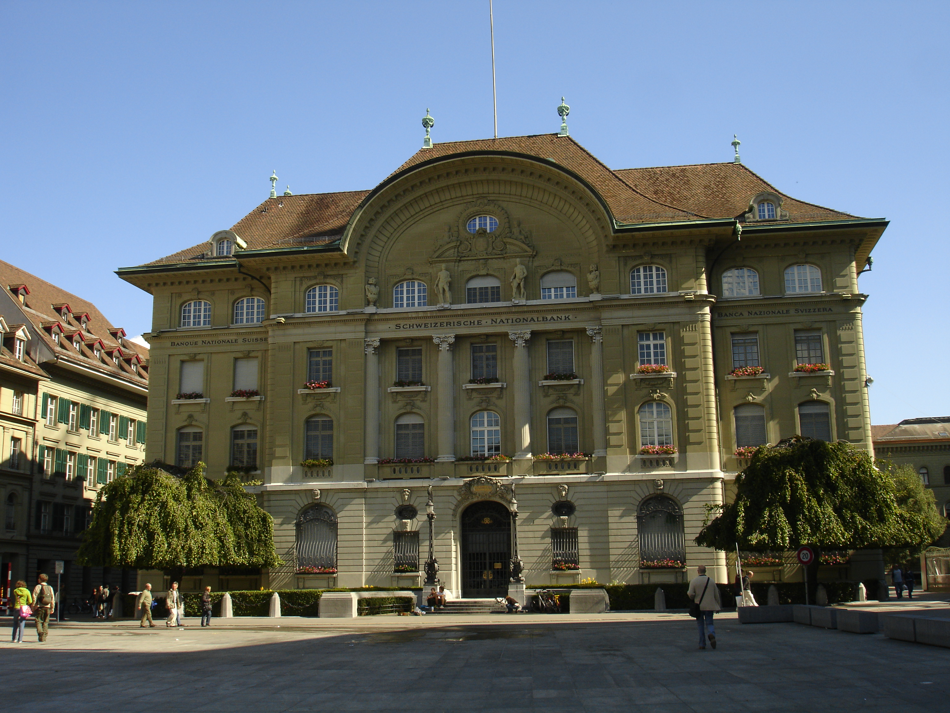 National bank of Switzerland - Banque Nationale Suisse - Schweizerische Nationalbank - Banca Nazionale Svizzera (Bern/Berne/Berna)